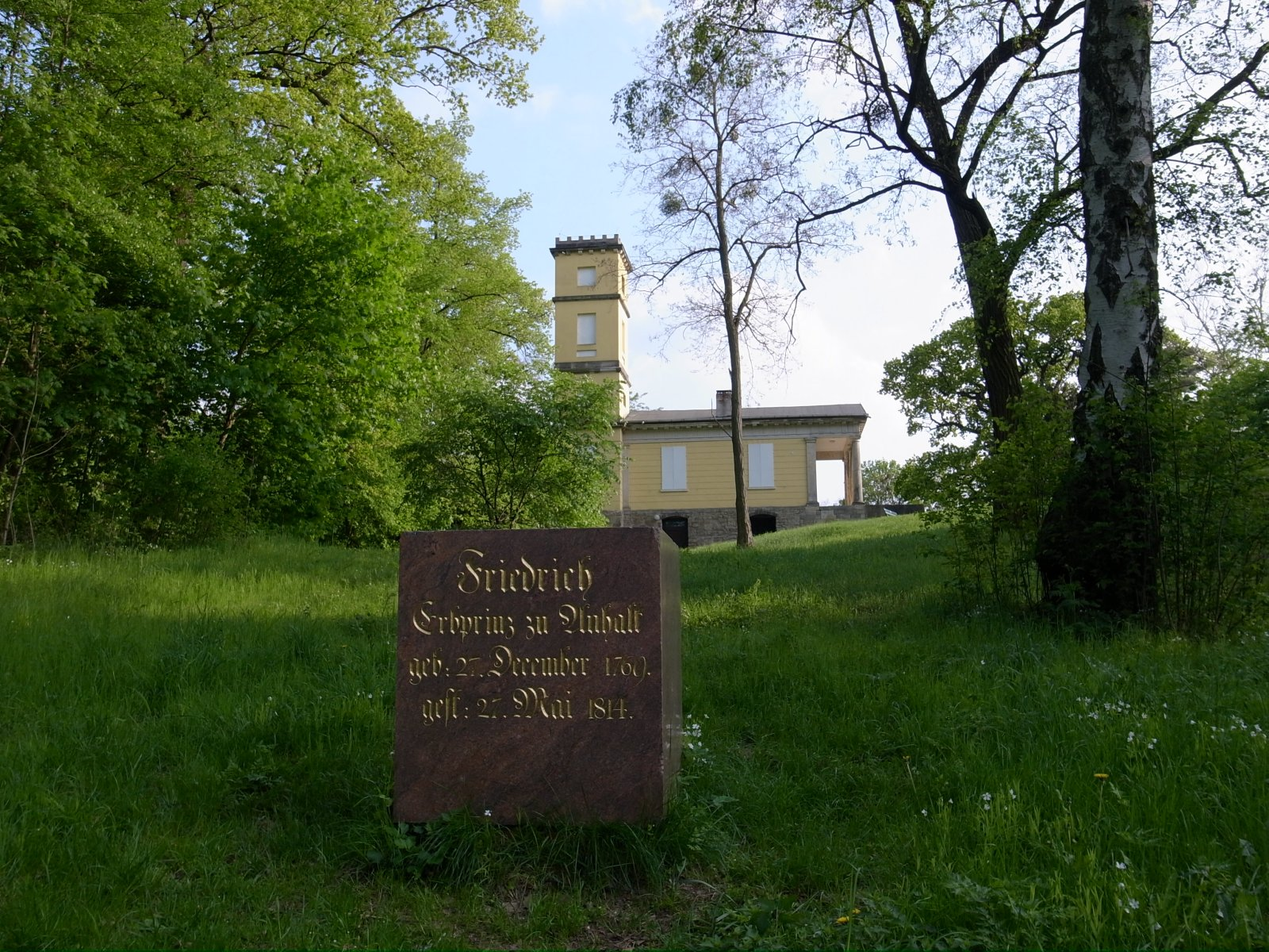 Friedrich Prinz von Anhalt-Dessau,Gedenkstein am Weinberghaus im Kühnauer Park.